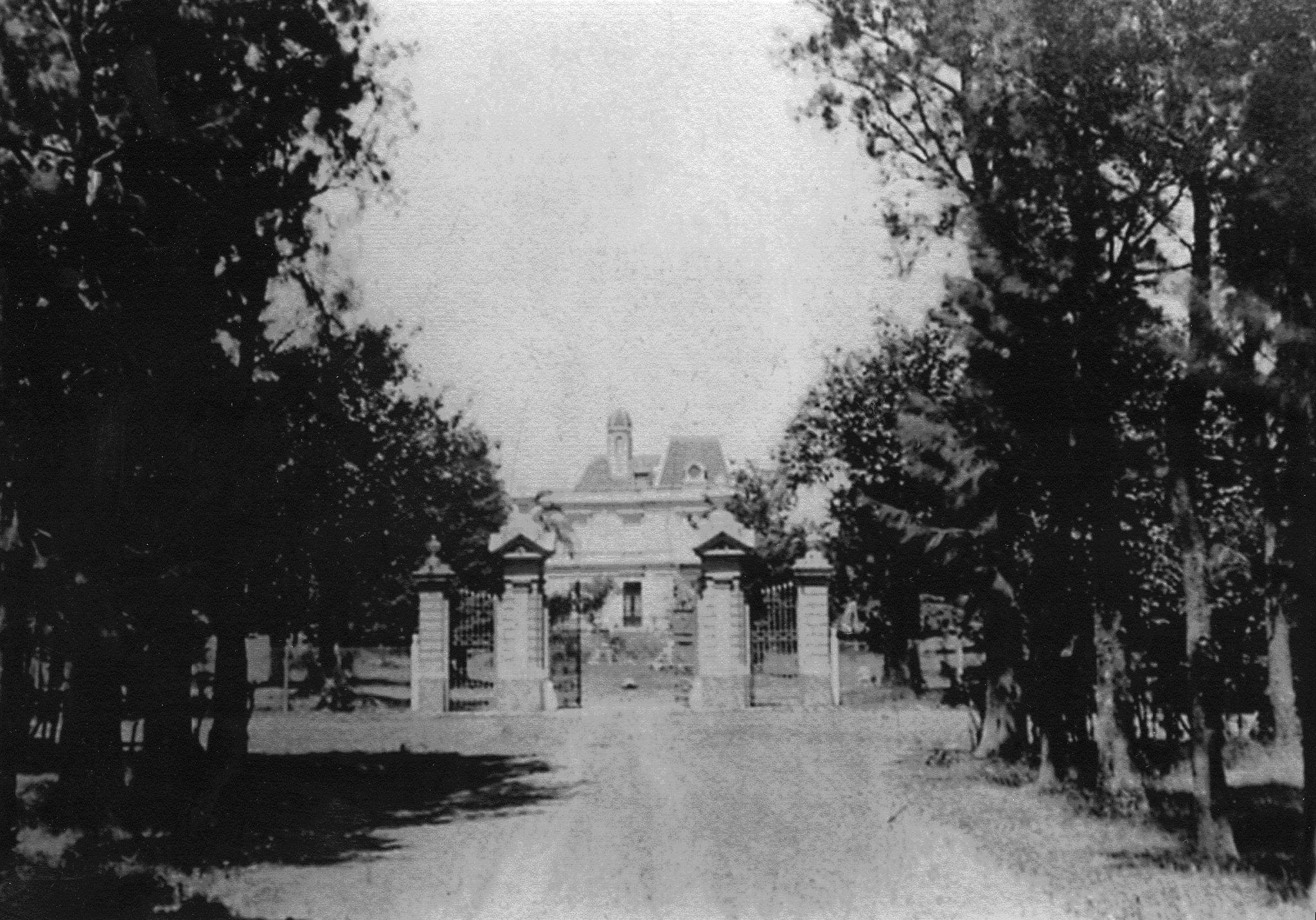 Antigua estancia Echeverry, Merlo, Buenos Aires.